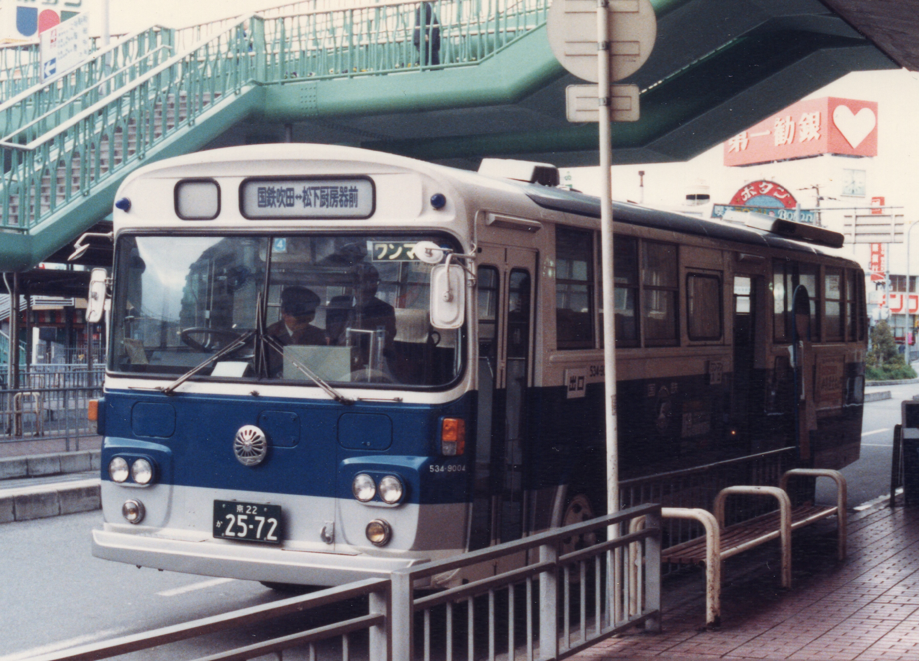 1987年 国鉄吹田駅前にて